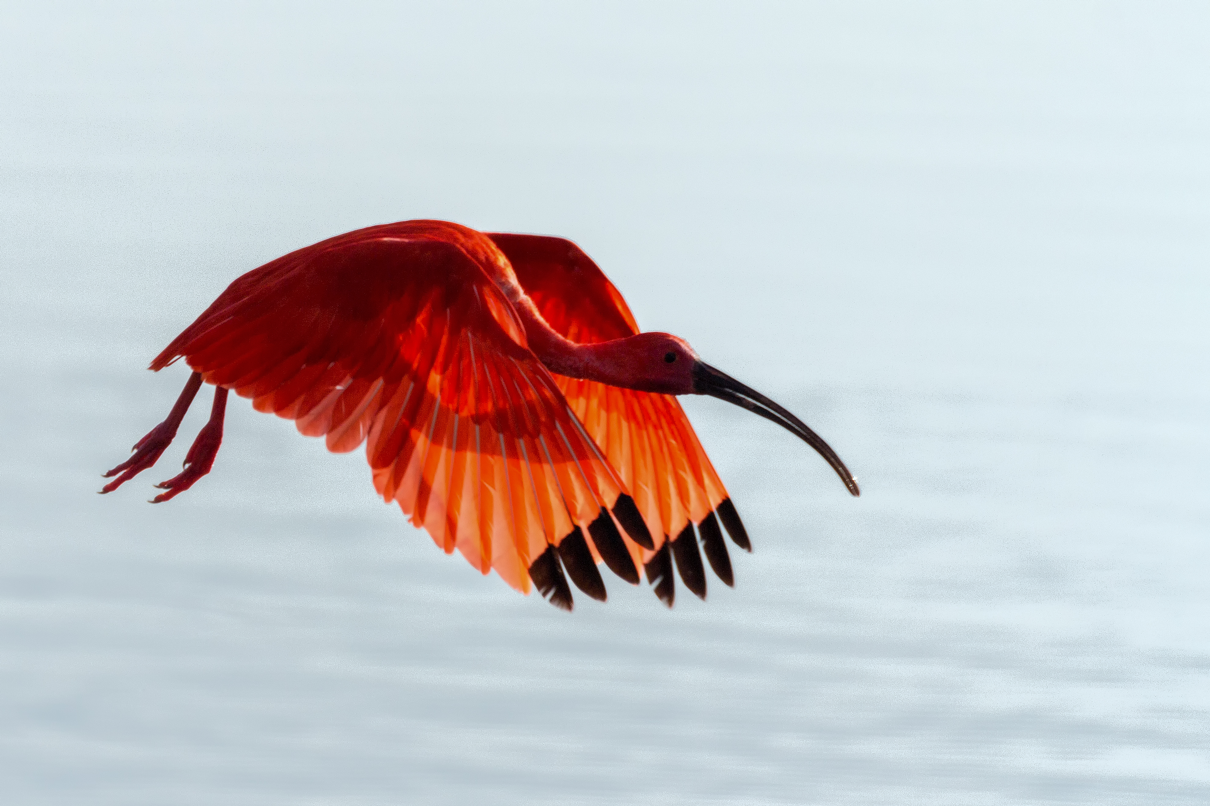 Scarlet Ibis | Corocoro Colorado (Eudocimus ruber)